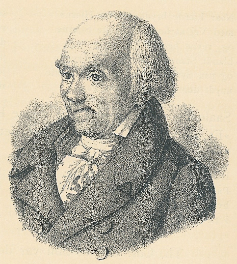 Thomas Christopher Bruun.